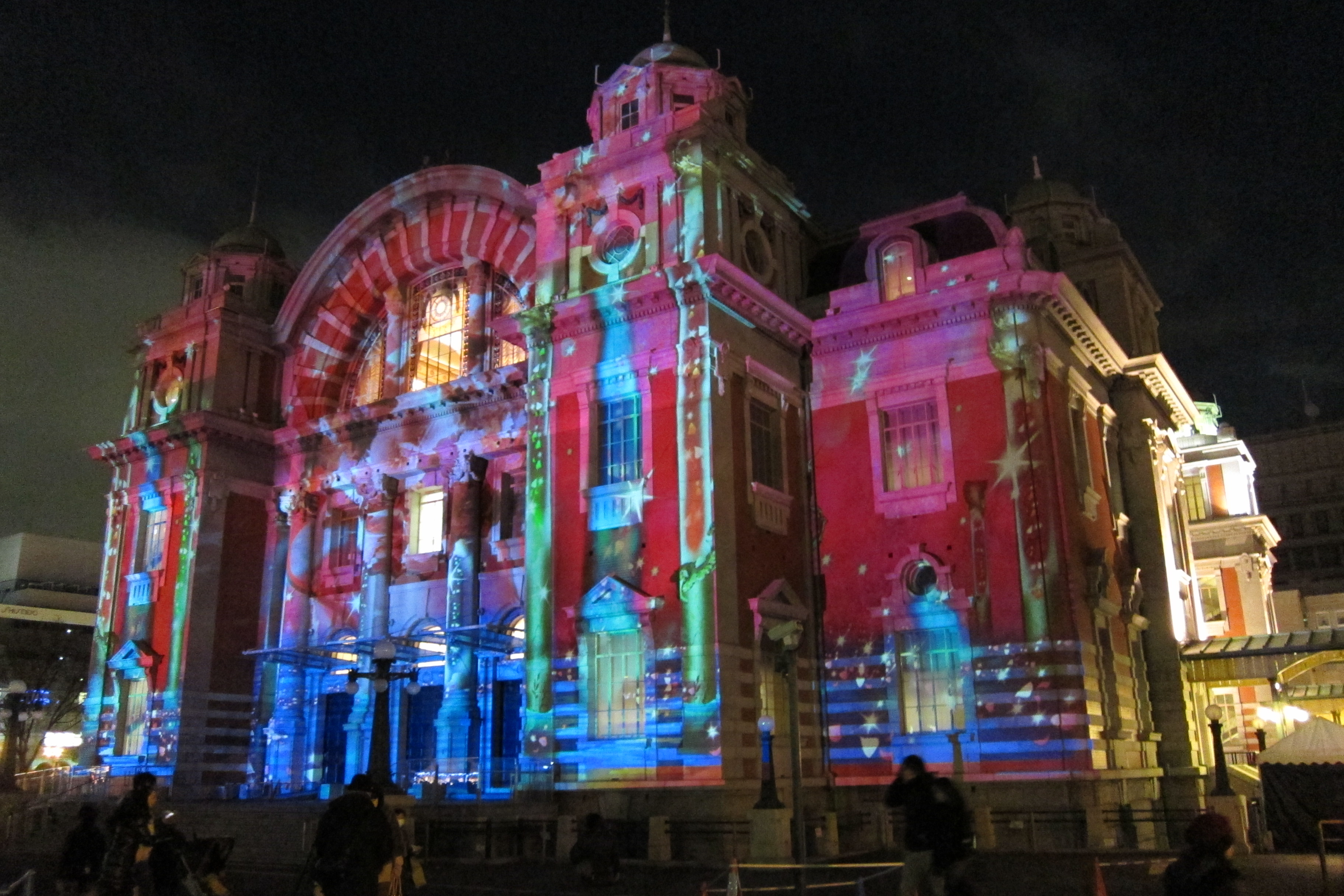 The OSAKA Hikari-Renaissance (大阪光のルネサンス) at Osaka City, Japan.